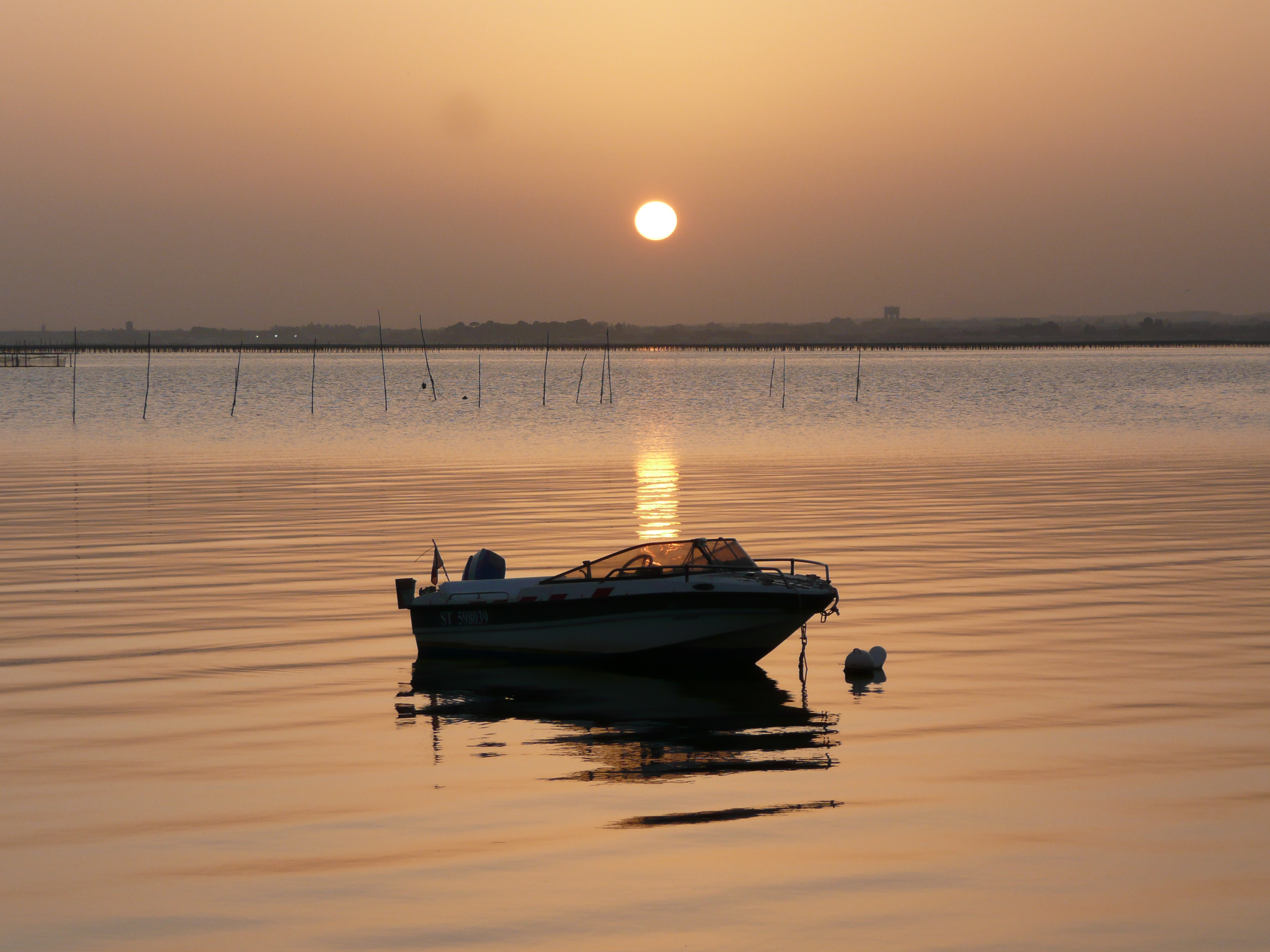 Coucher de soleil en France été 2008